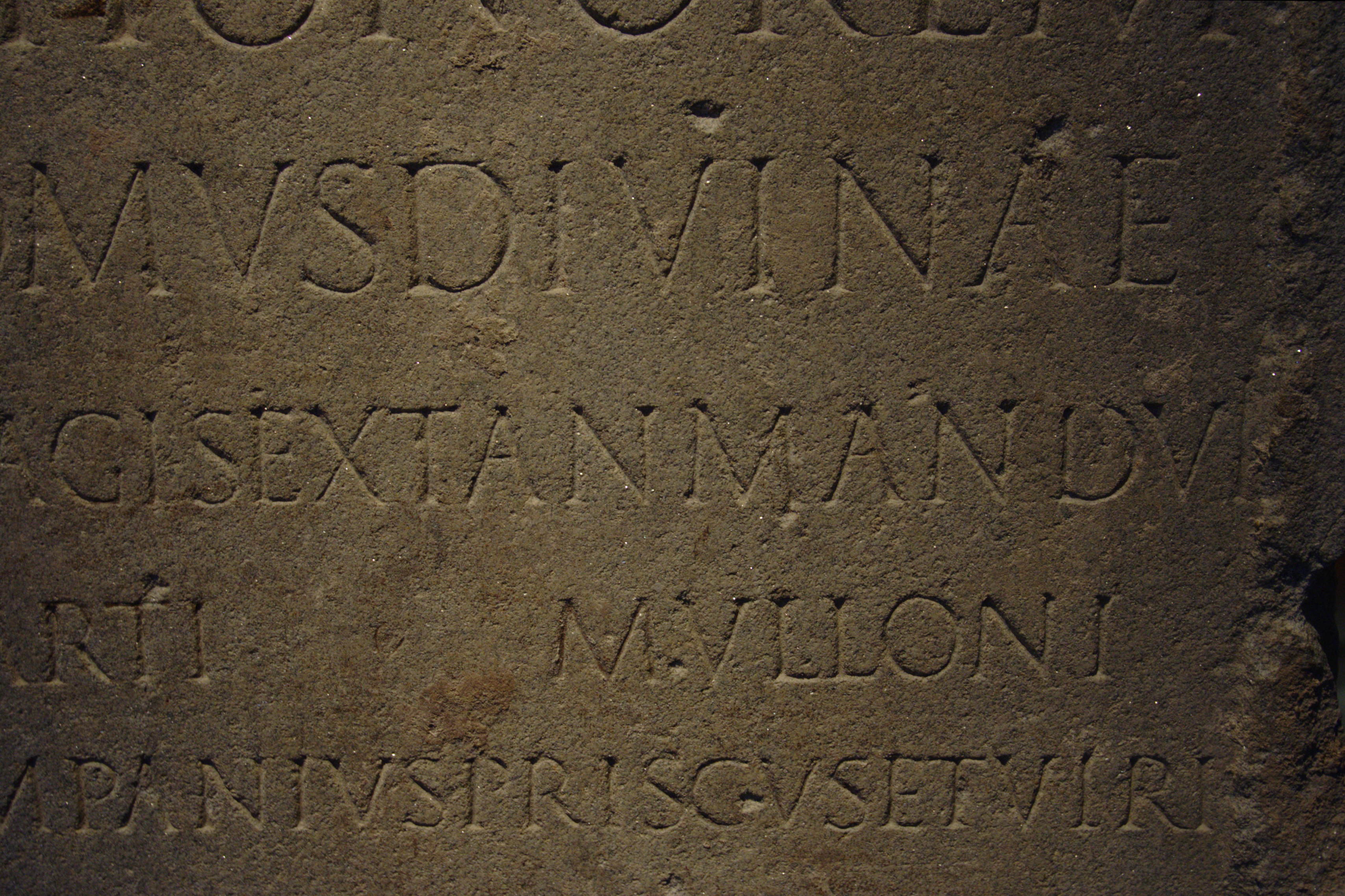 Détail d'une base avec inscription